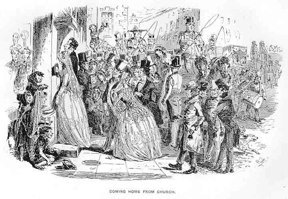 Dombey and Son, Retour de l'église après le mariage de Dombey et d'Edith (chapitre 31)